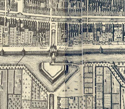 Waterslootsepoort